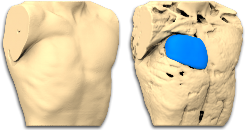 Sindrome de Poland uomo CAD Impianto